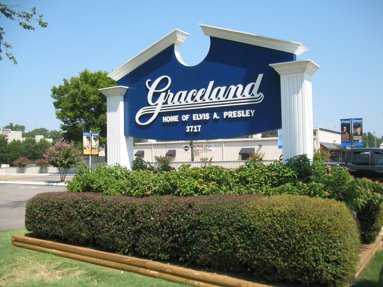 Witamy w Graceland !